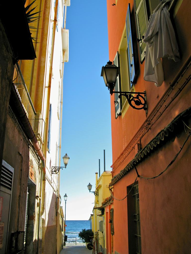 Caruggio del centro storico di Alassio, Liguria, Italy